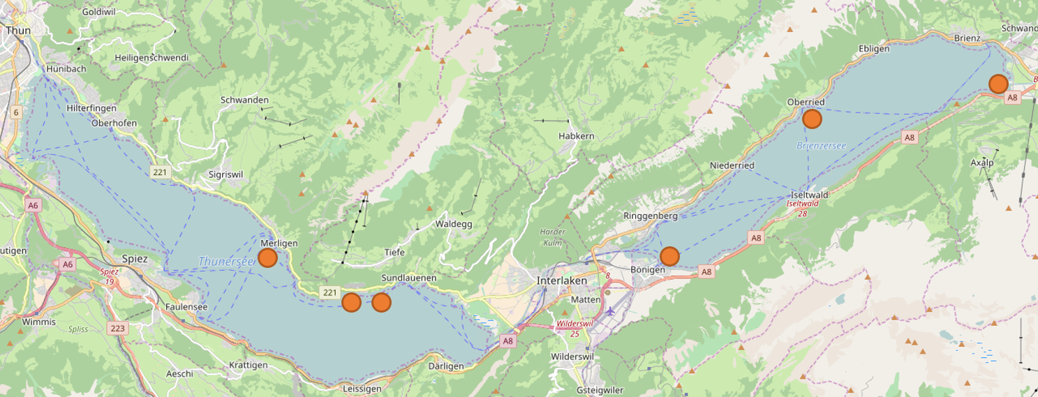 Orte der Munitionsversenkungen in Schweizer Seen im Thunersee und Brienzersee. Karte: OpenStreetMap.